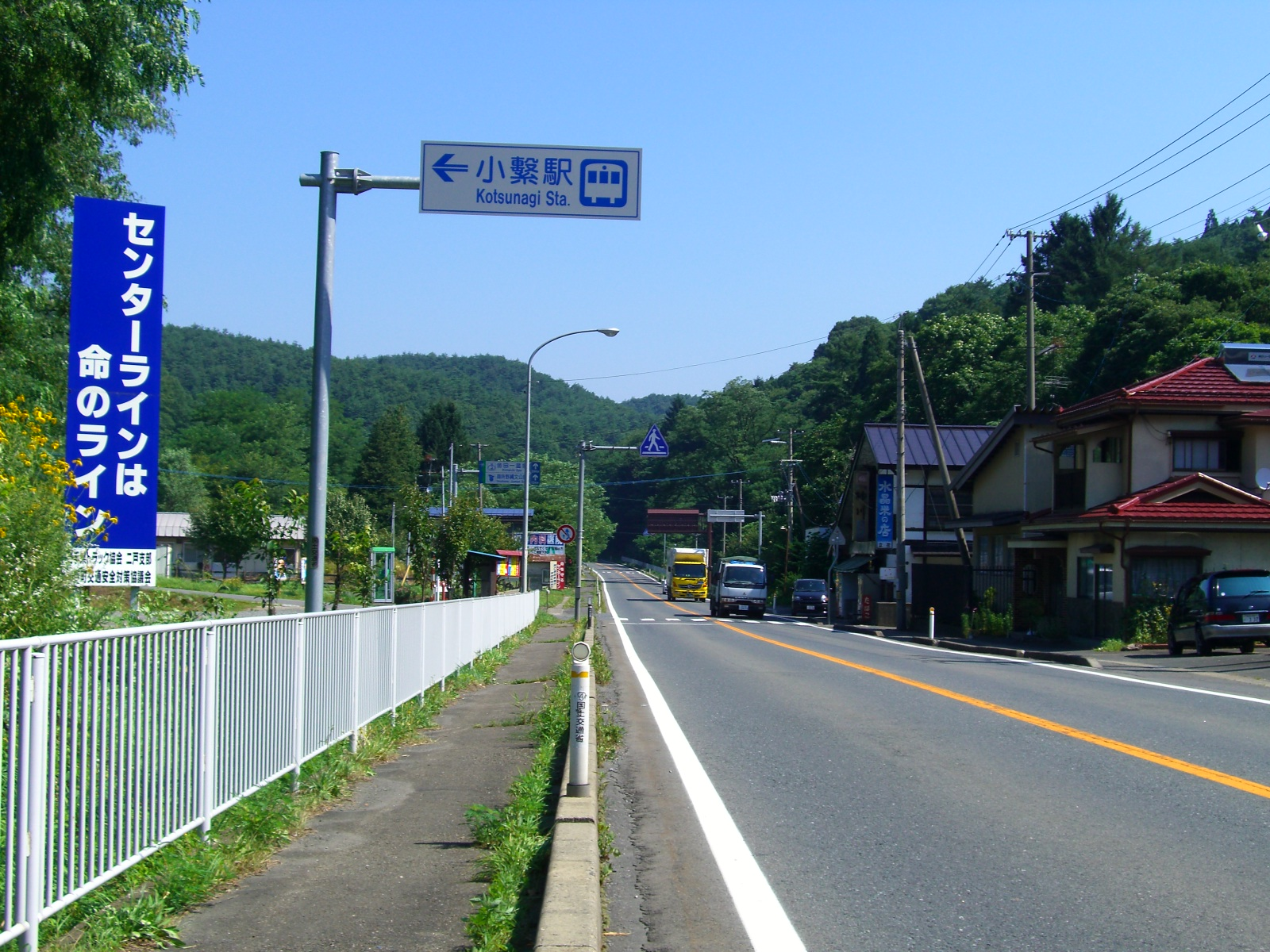 一戸 いわて銀河鉄道 小繋駅